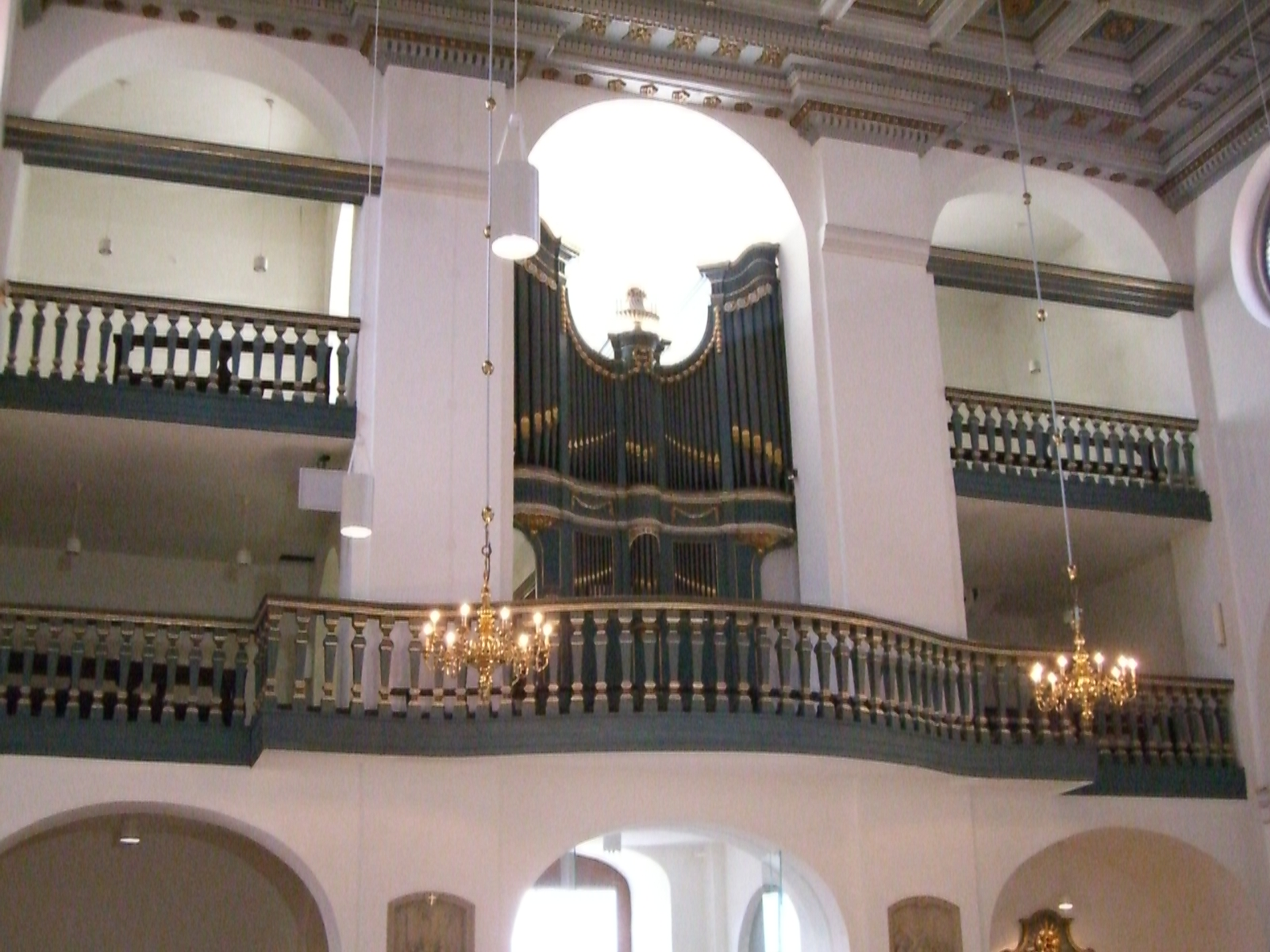 Orgelempore in St. Regina Drensteinfurt / Church Organ of Saint Regina